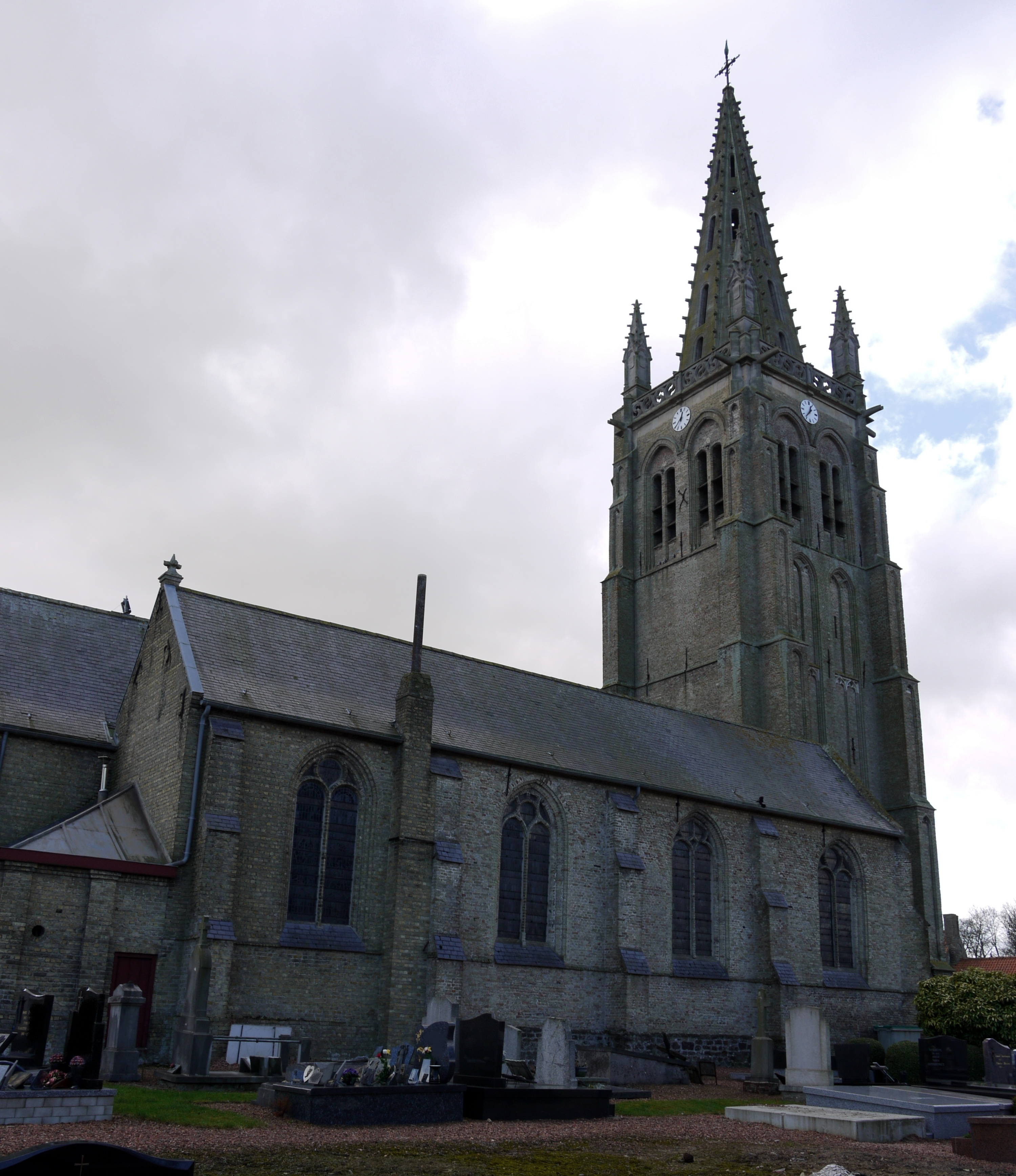 Église Saint-Léger de Socx, (Inscrit, 1944)